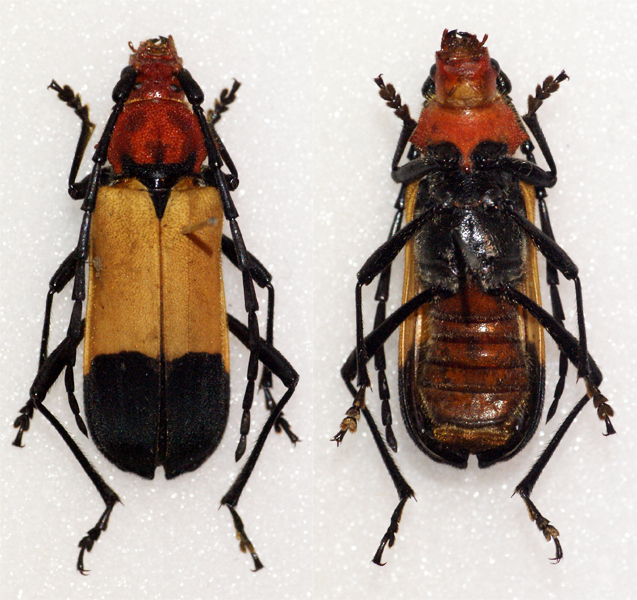 Thomson,1864 Sex: Female Data: 12-2011 - Mtwara - Tanzania Size: ?